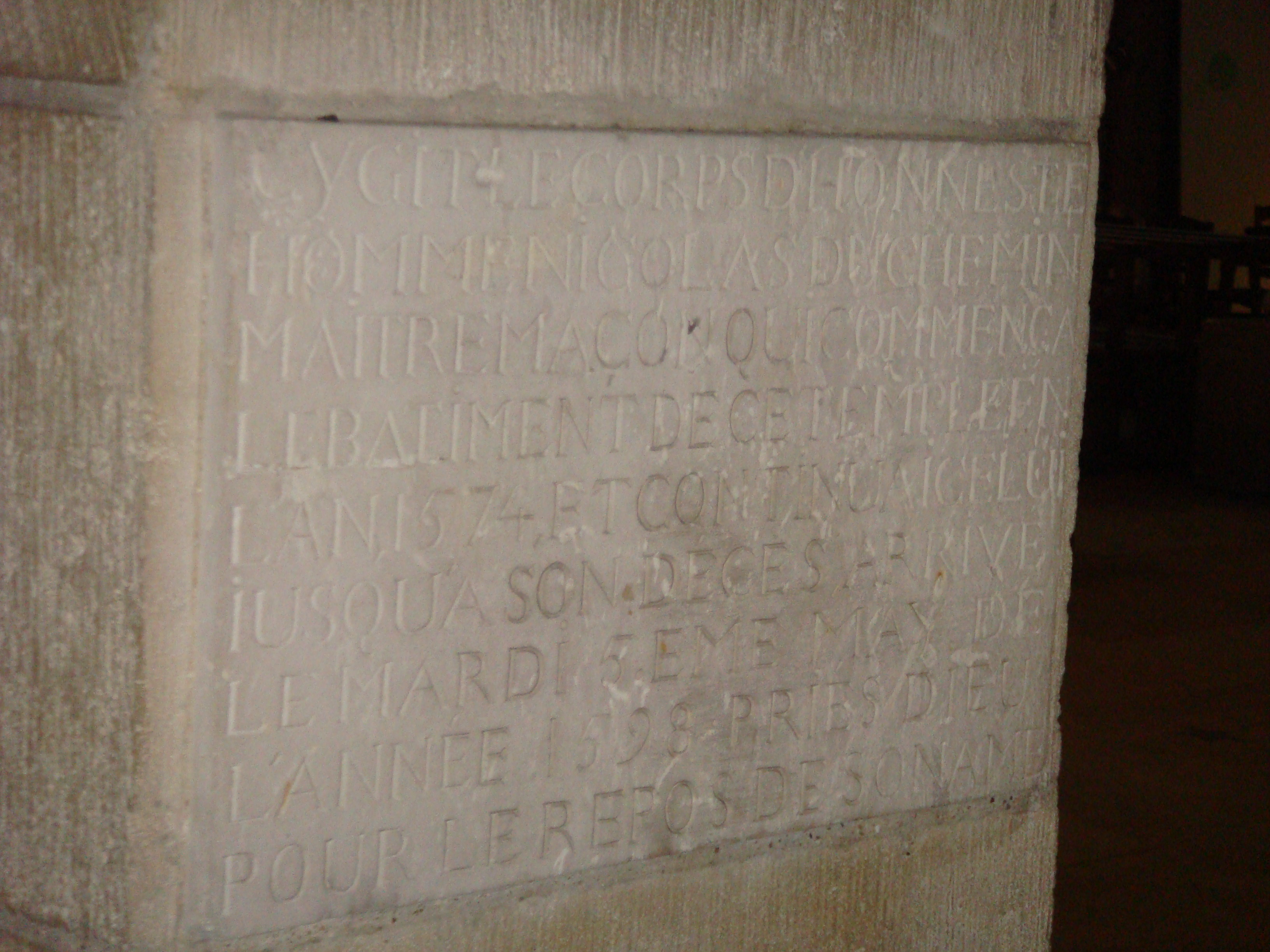 Plaque funéraire de Nicolas Duchemin sur un pilastre.